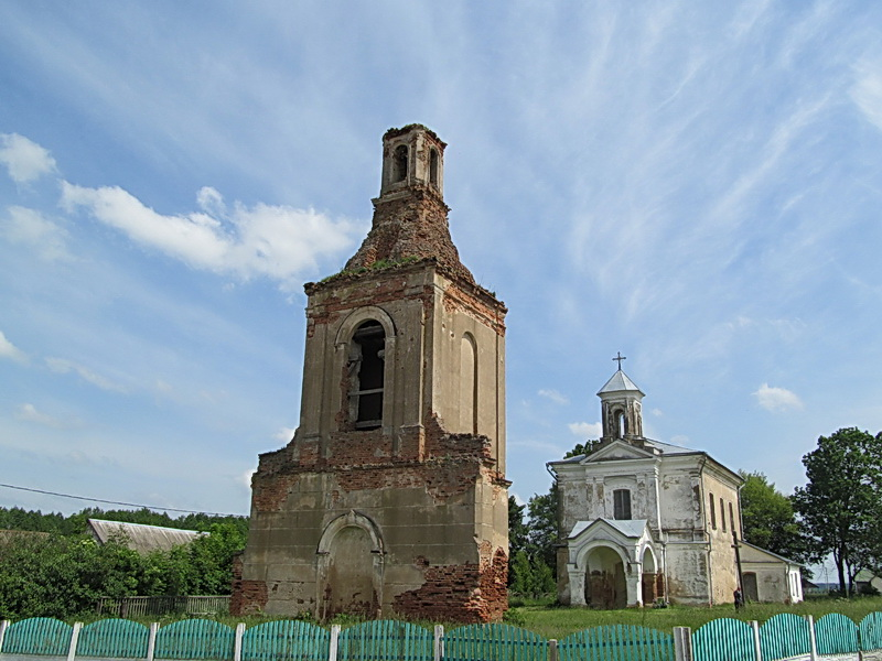 Новадзевяткавічы. Касцёл Сьвятых Пятра і Паўла са званіцай